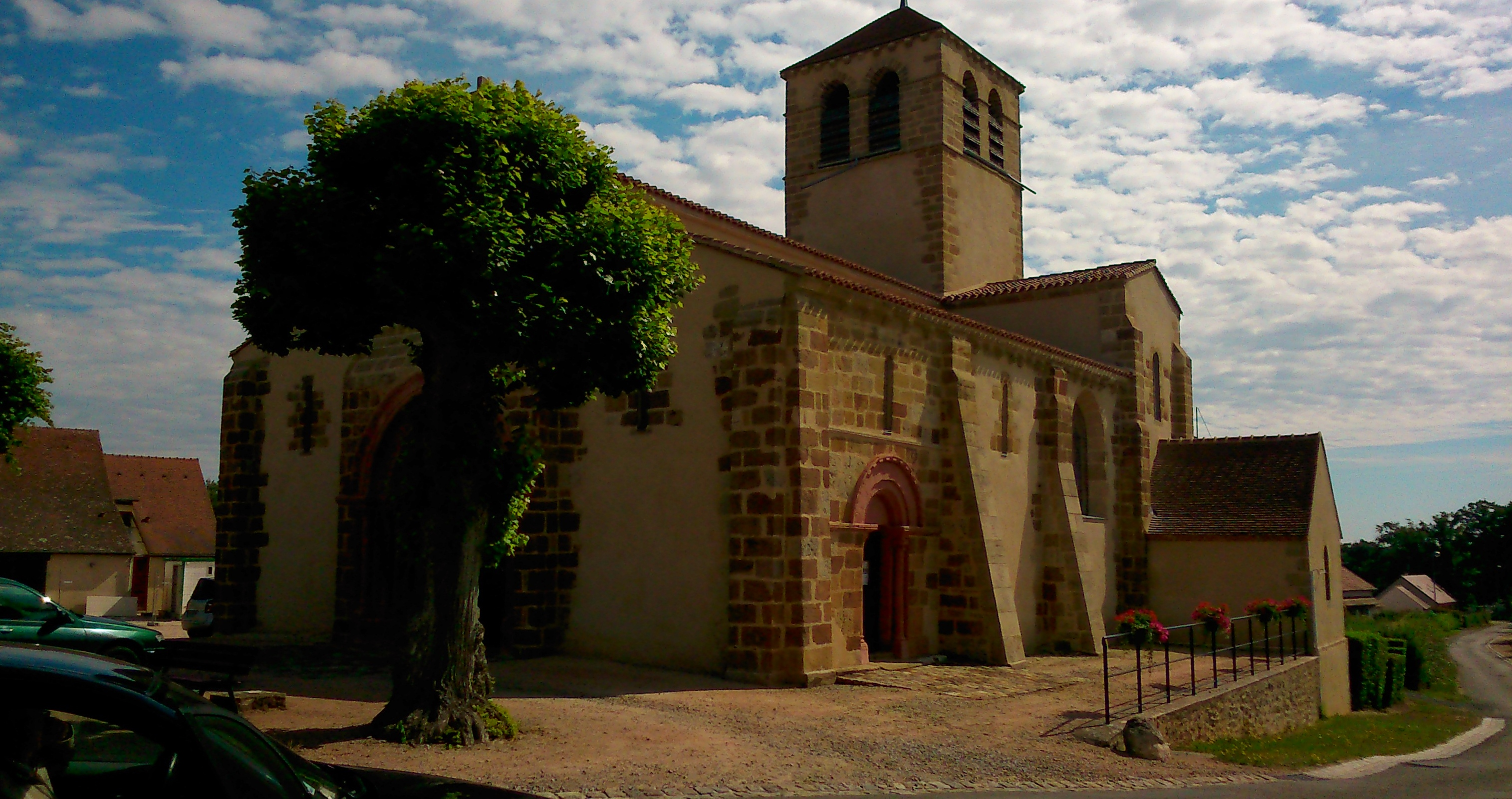 Église Saint-Denis .